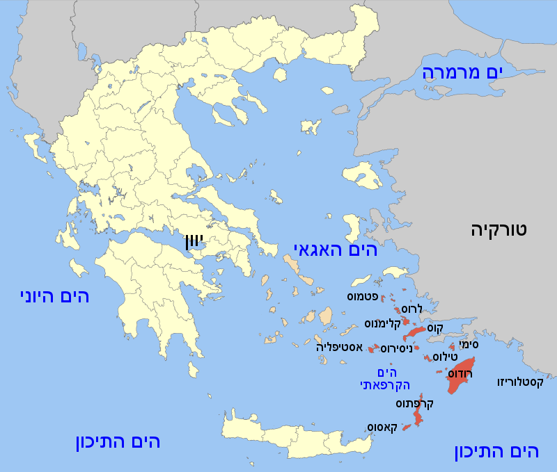 Nomos Dodekanisou HE